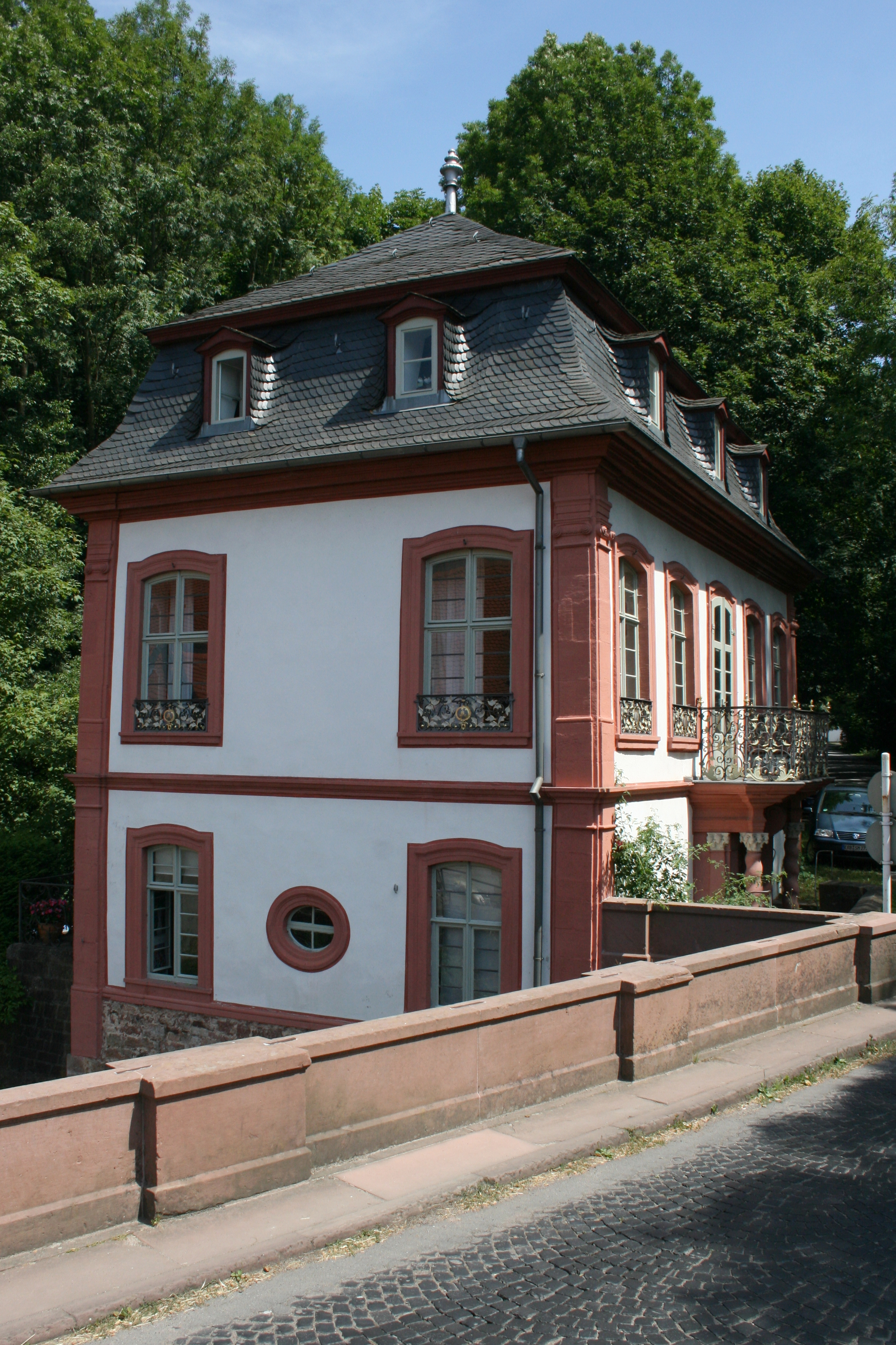 Schloss Fürstenau, Michelstadt-Steinbach im Odenwald, Hessen. Ansicht des barocken Kavalierbaus an der Mümling.